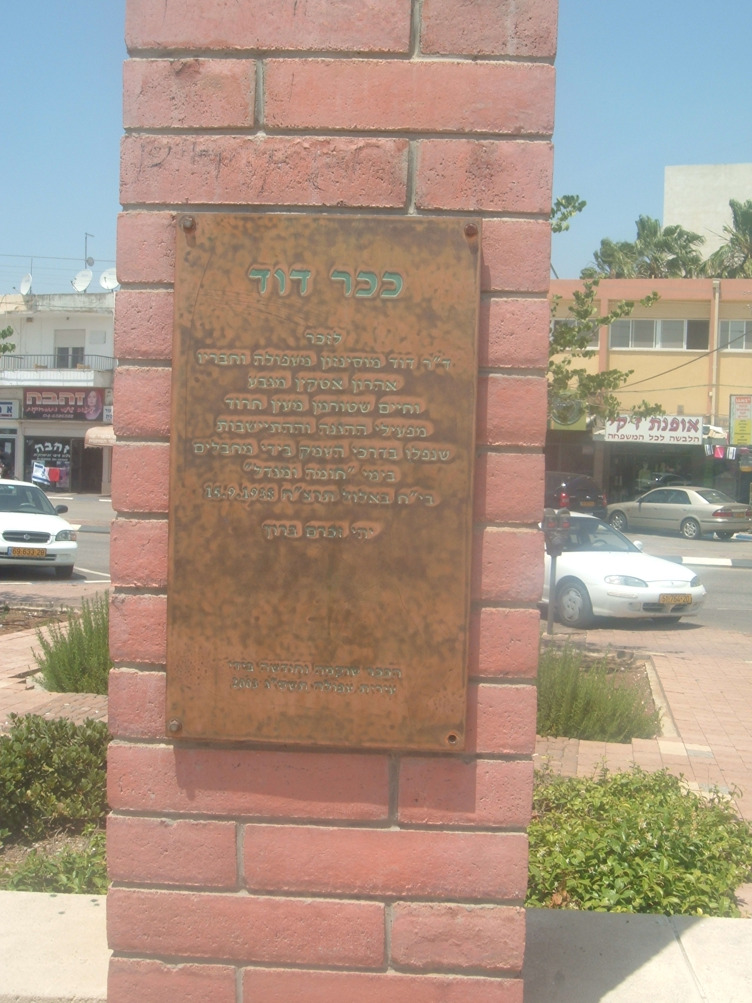 memorial plaque in memory of shturman, etkin and mosinzon, in "david square" afula israel. לוח זכרון לזכר חיים שטורמן, אטקין ודוד מוסינזון ב"ככר דוד" בעפולה